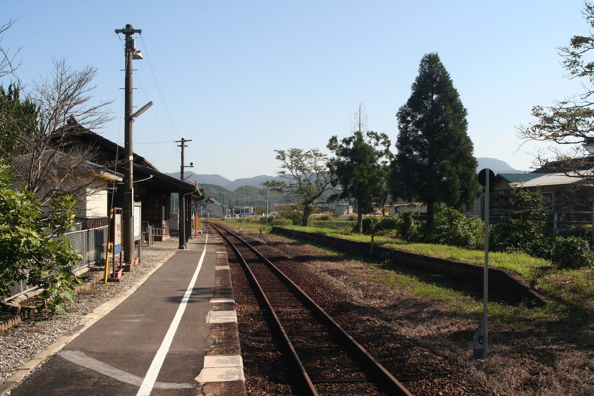 西日本旅客鉄道 野馳駅の構内